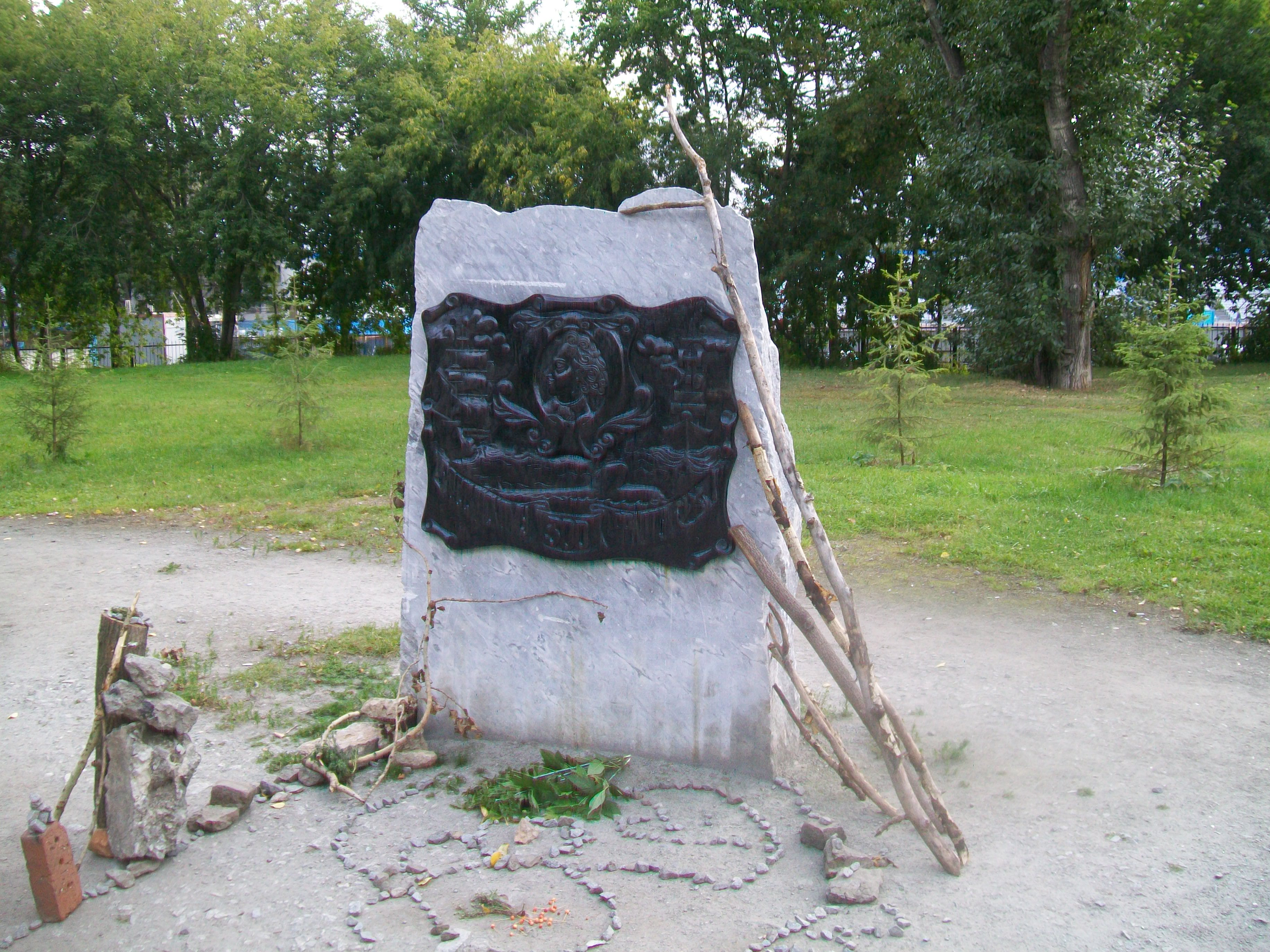 Памятный знак к 300-летию Российского флота. Екатеринбург. Фото 2017 года